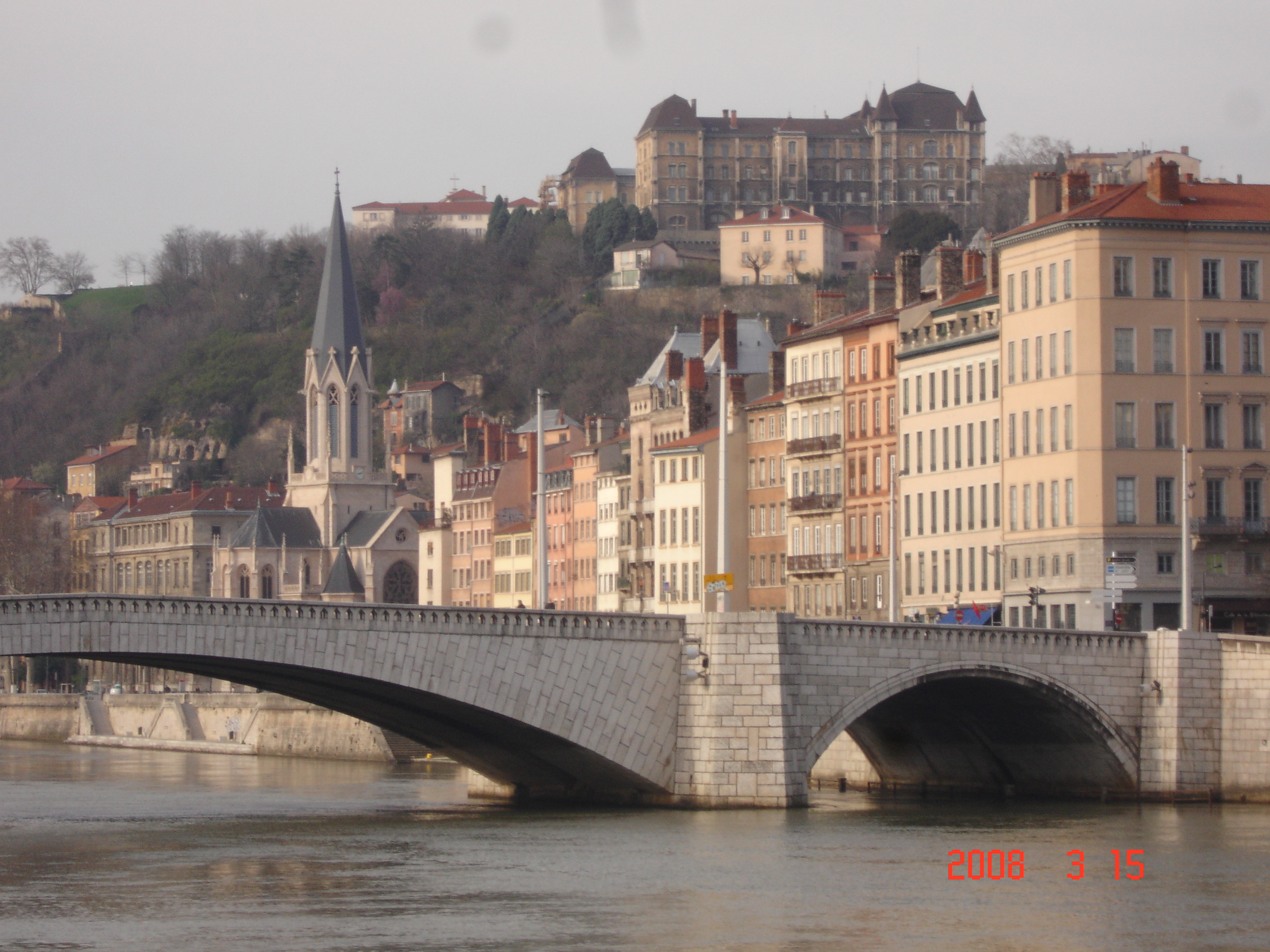 Lyon-Saint Georges vu du pont Tilsitt